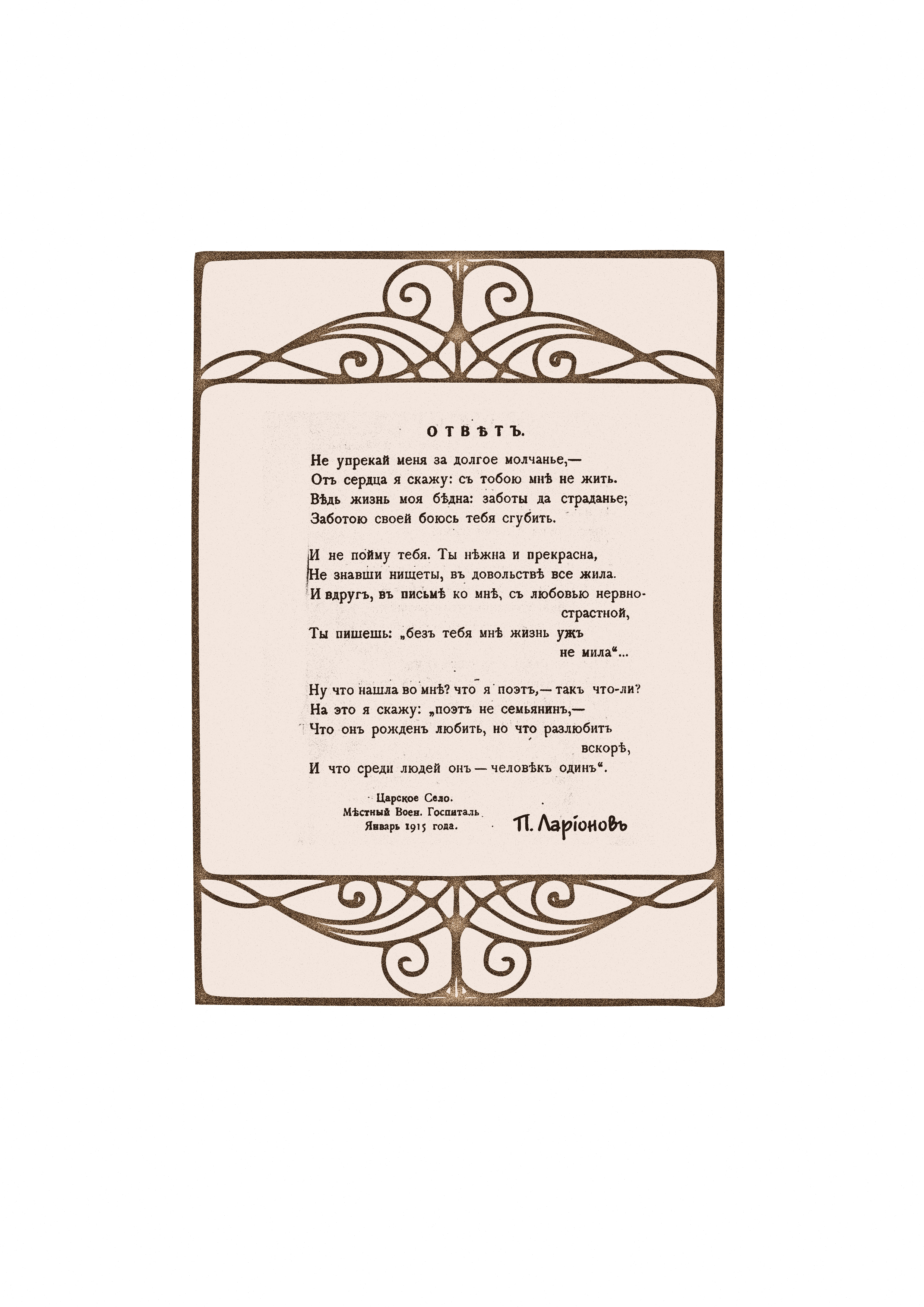 Петр Андреевич Ларионов «Ответ»